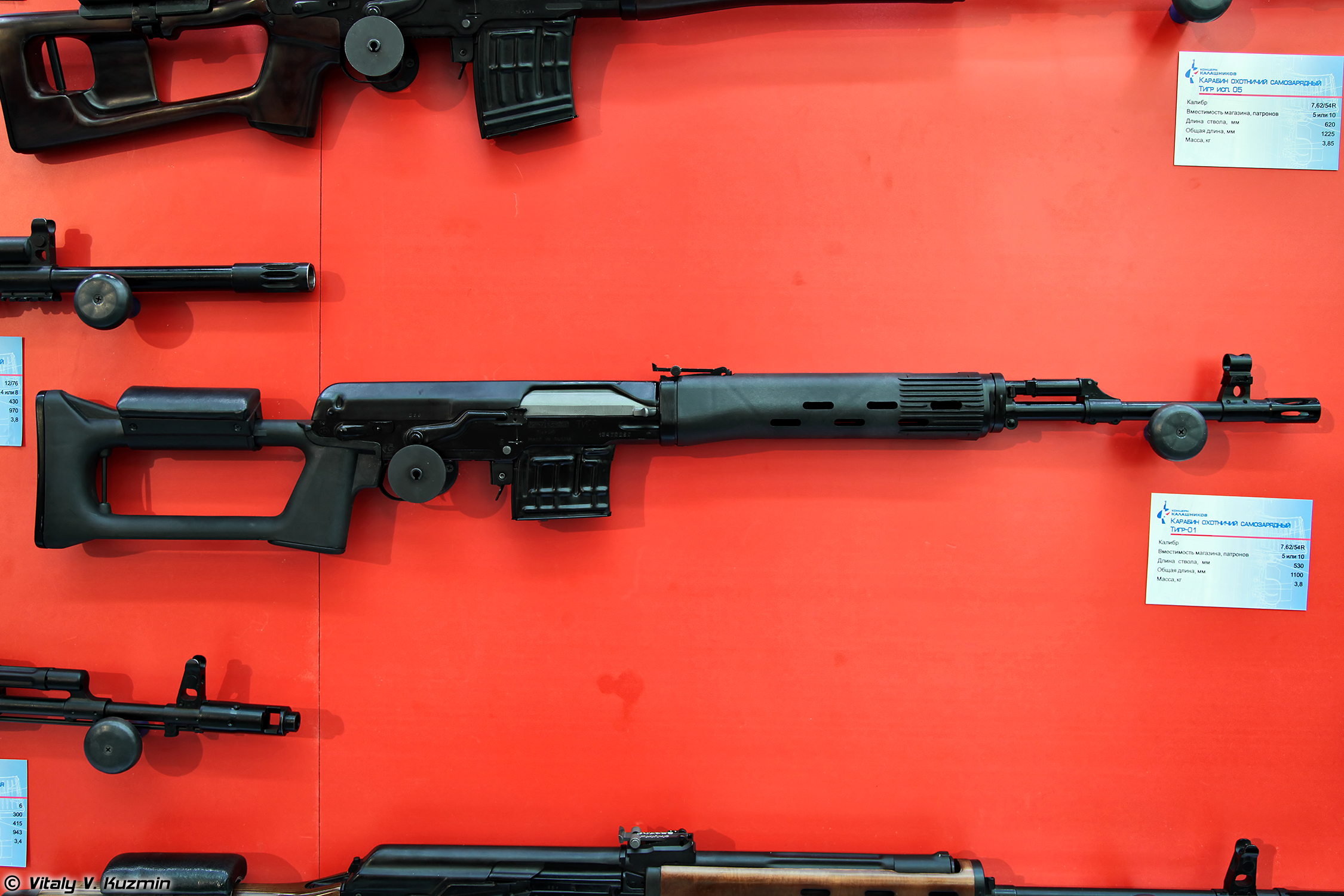 7,62х54R карабин Тигр-01 (7.62x54R Tigr-01)